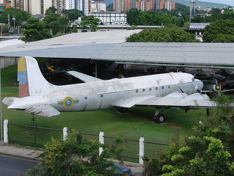 Este es el avión donde emprendió la huida Marcos Pérez Jiménez. (1958) El avión con el apelativo La Vaca Sagrada es un modelo Douglas C-54 Skymaster cuatrimotor, el único avión presidencial desde su compra por Rómulo Gallegos hasta el gobierno de Rafael Caldera quien compró un H-748.